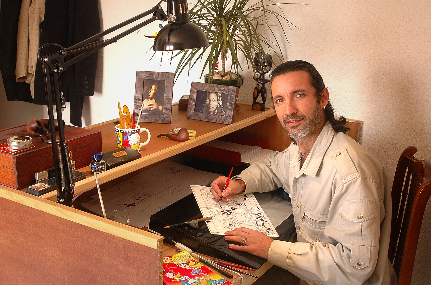 Wanda Gattino trabajando